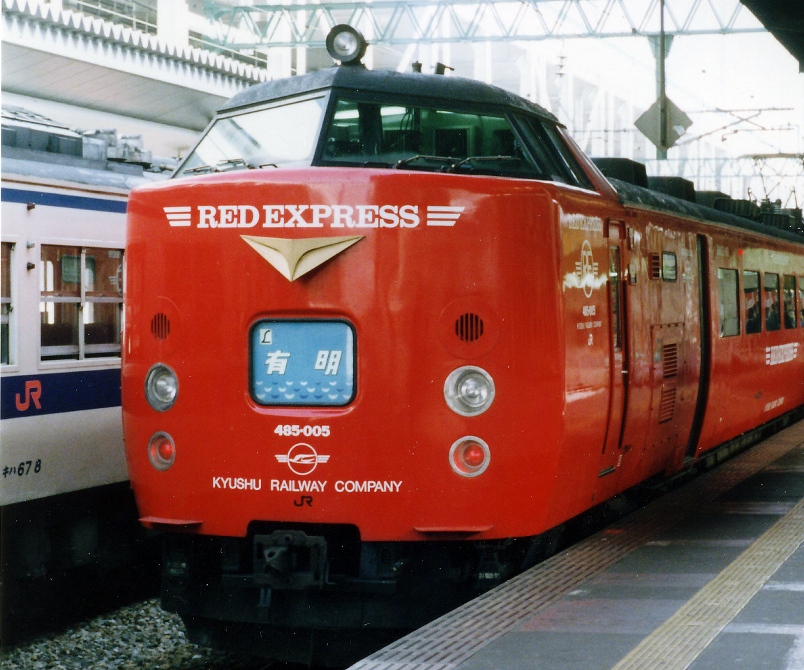 485系RED EXPRESS色「有明」イラスト入りヘッドマーク（博多駅にて）